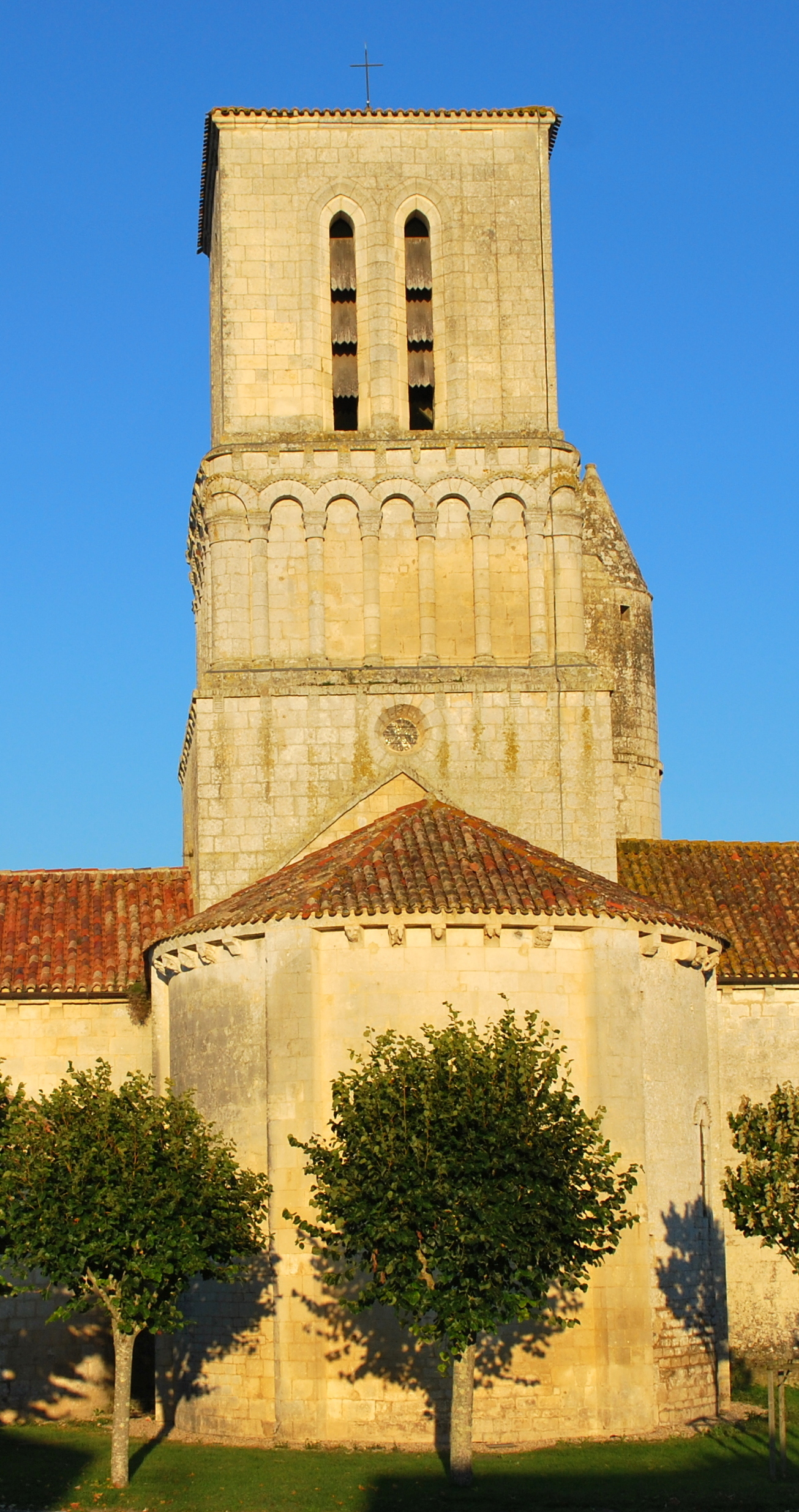 Corme-Ecluse église Notre-Dame façade est